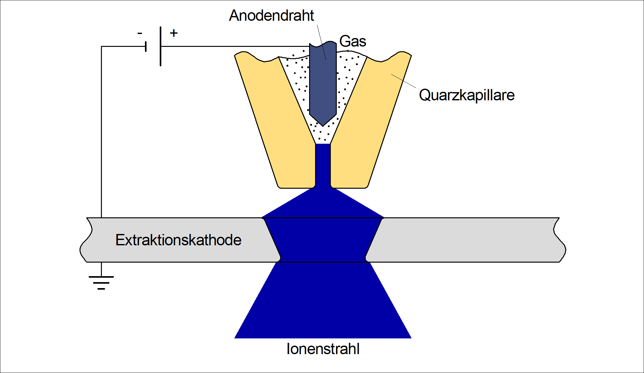 Prinzipzeichnung eines Quarzkapillaritrons